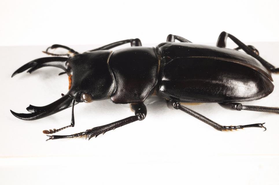 Imagen lateral del Macrodorcas costipennis (= Digonophorus costipennis Nagai, 2000)